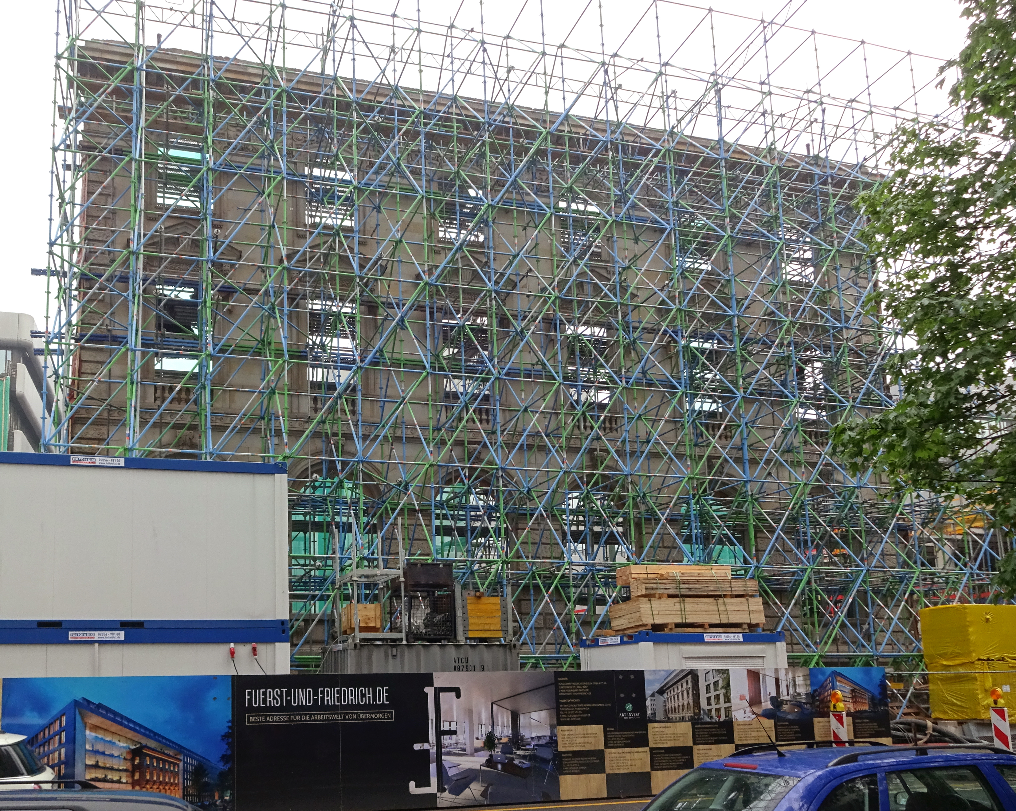 Fürstenwall Baustelle Fassade ehemals Fürstenwallstraße 154 (alte Nr.), Gebäudekomplex Friedrichstraße 56–60 und Fürstenwall 166–172, Düsseldorf